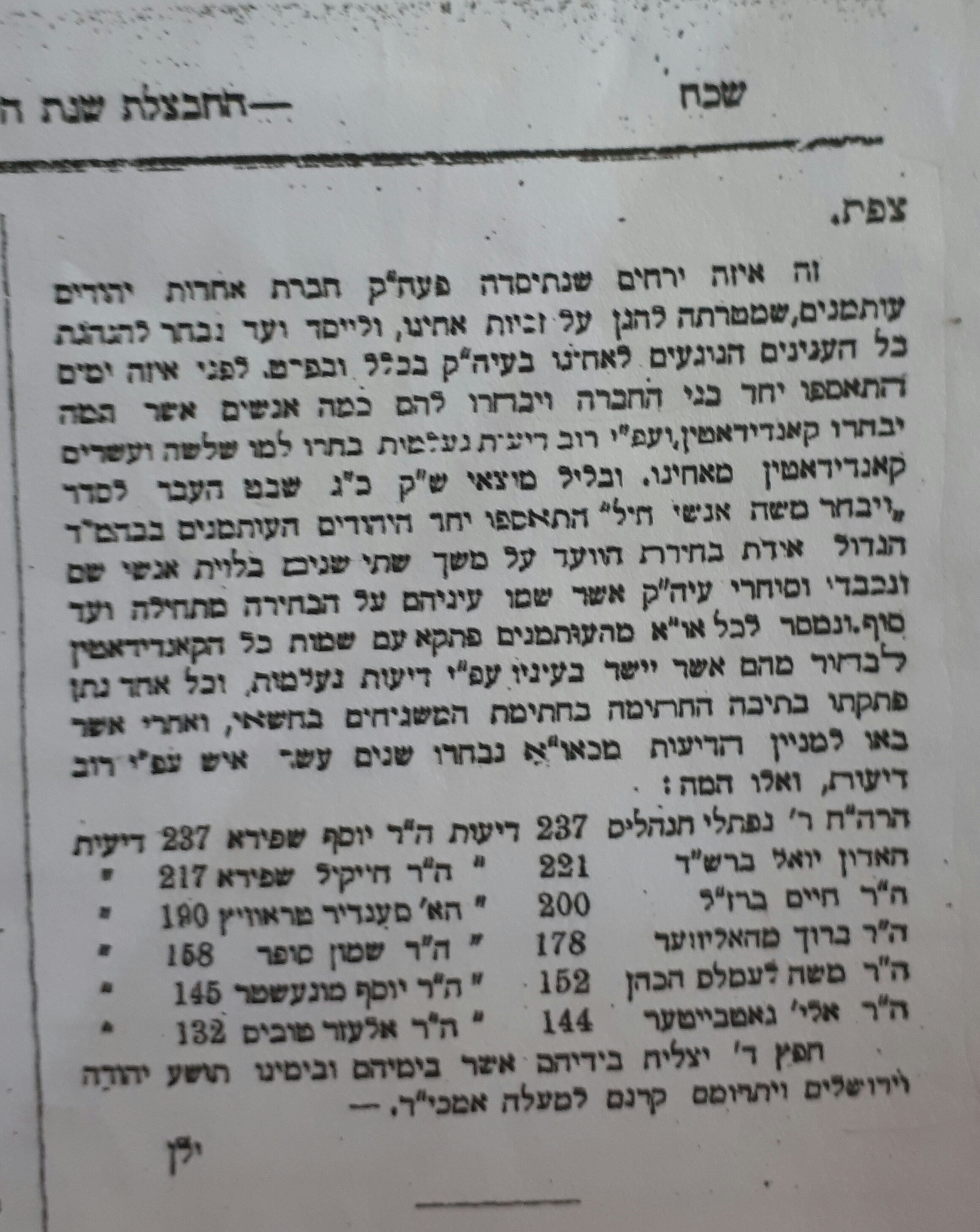 כתבה בעיתון החבצלת המדווחת על בחירות לאגודת "אחדות היהודים העות'מנים בצפת